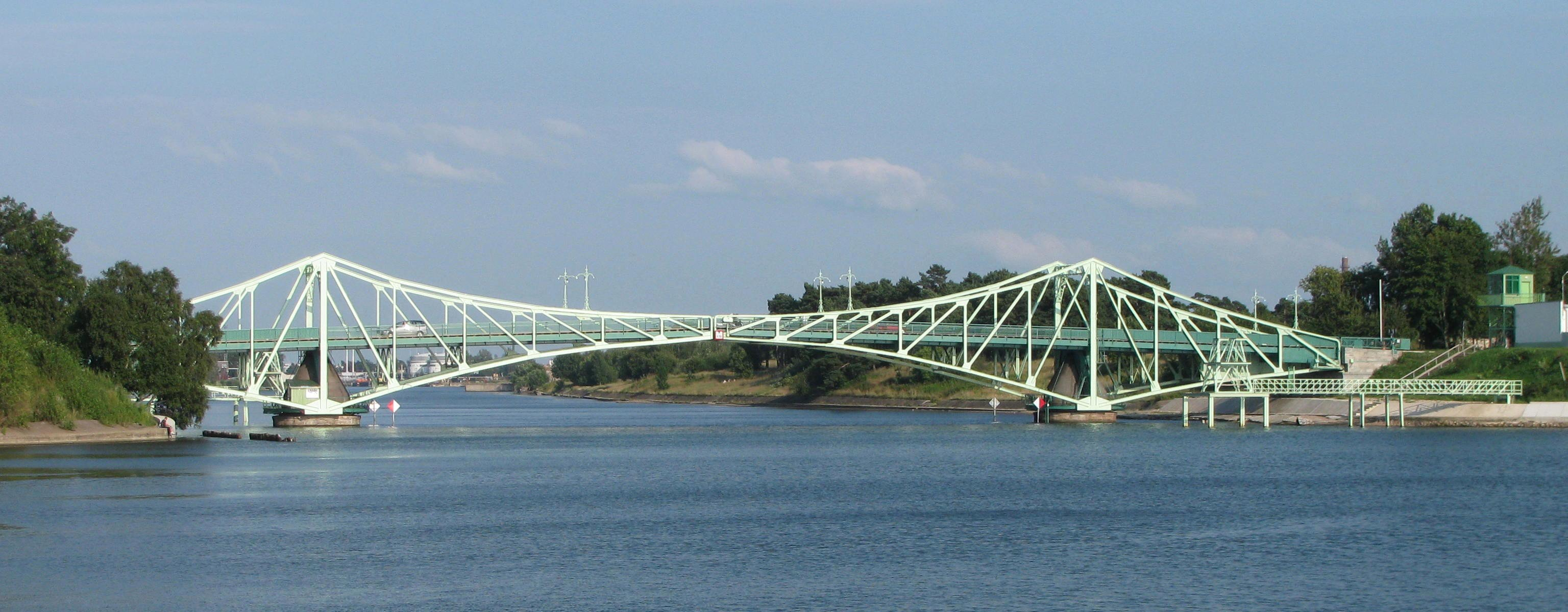 Dvojitý otočný most Oskara Kalpaka spojující bývalý vojenský přístav Karosta se Severním předměstím, Liepāja, Lotyšsko. Vybudován roku 1906, nosnost je pouze 5 tun.